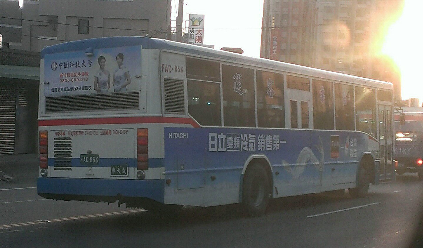 苗栗客運2006年日野ERK2JRL大客車FAD-856，行駛於苗栗縣頭份市中正一路。